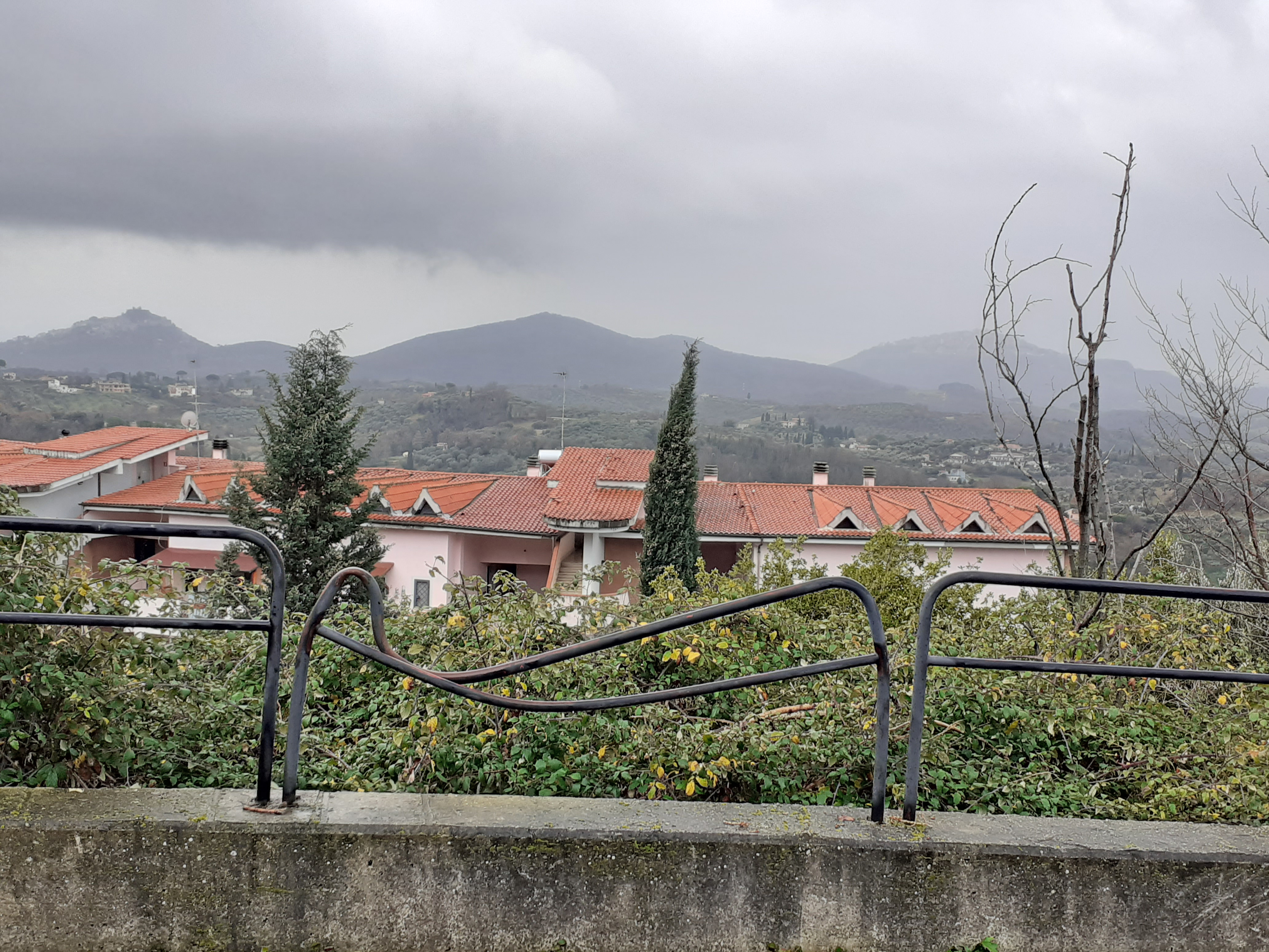 I monti Cornicolani visti da Palombara Sabina